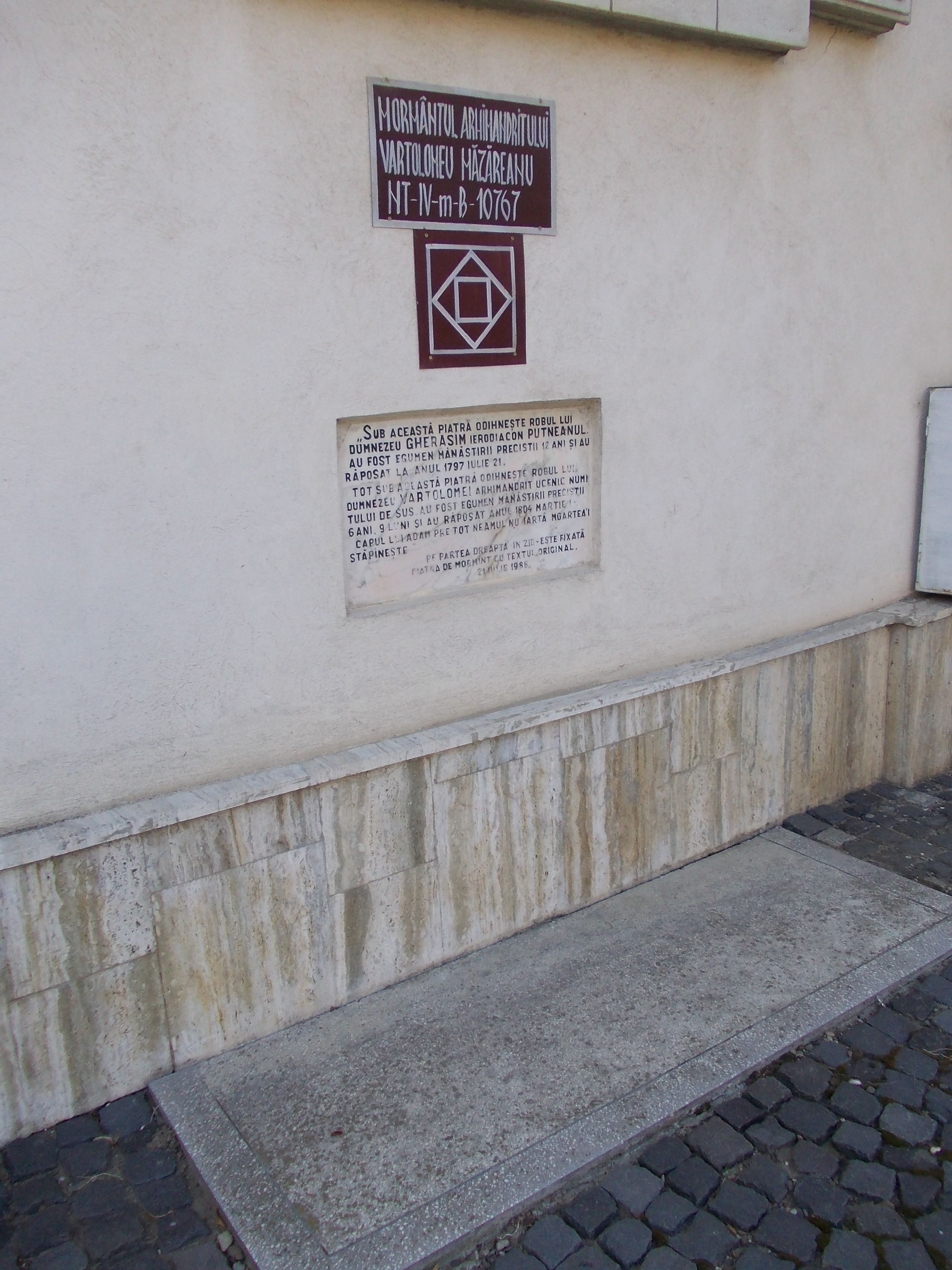 Mormântul arhimandritului Vartolomeu Măzăreanu